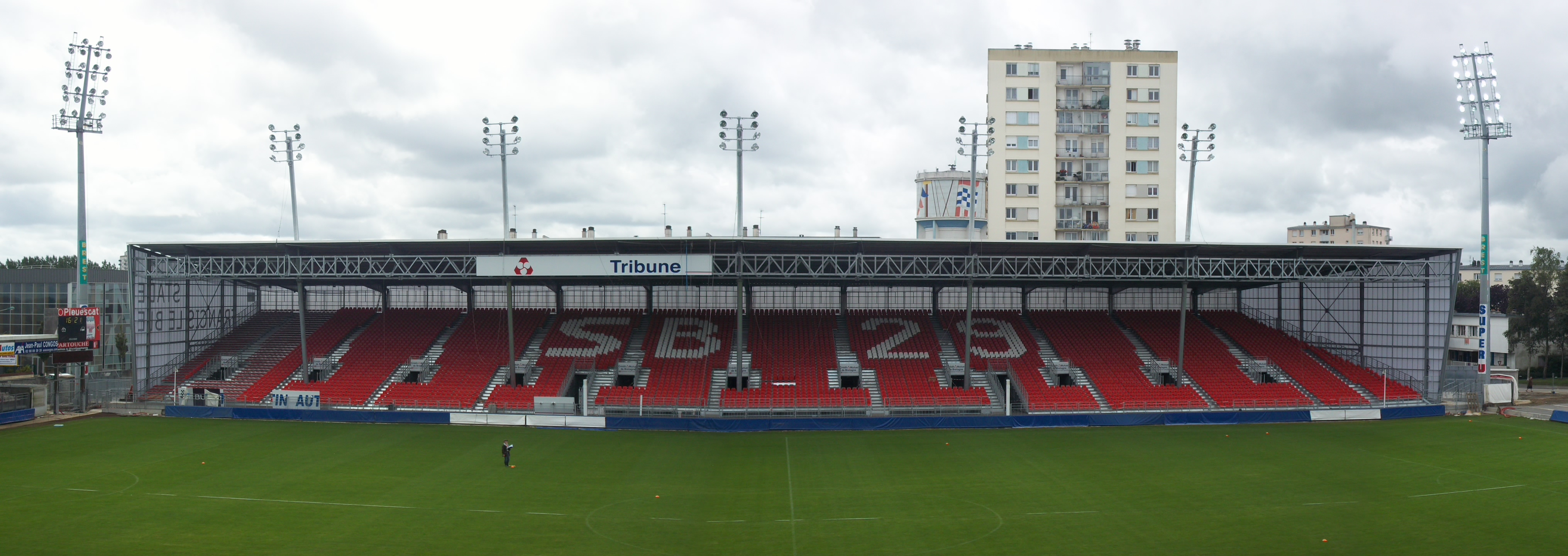 Stade français de brest